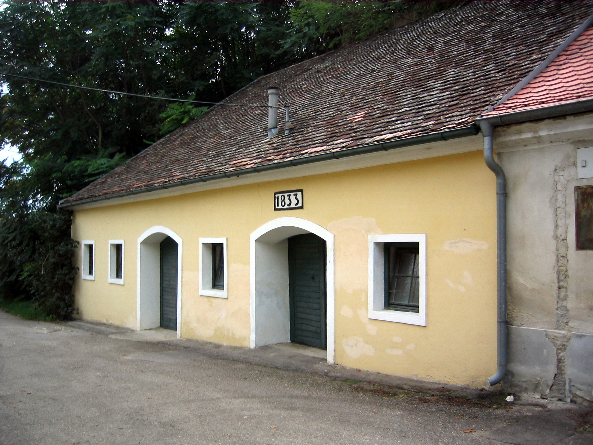 Mühlbergkellergasse Objekt 17